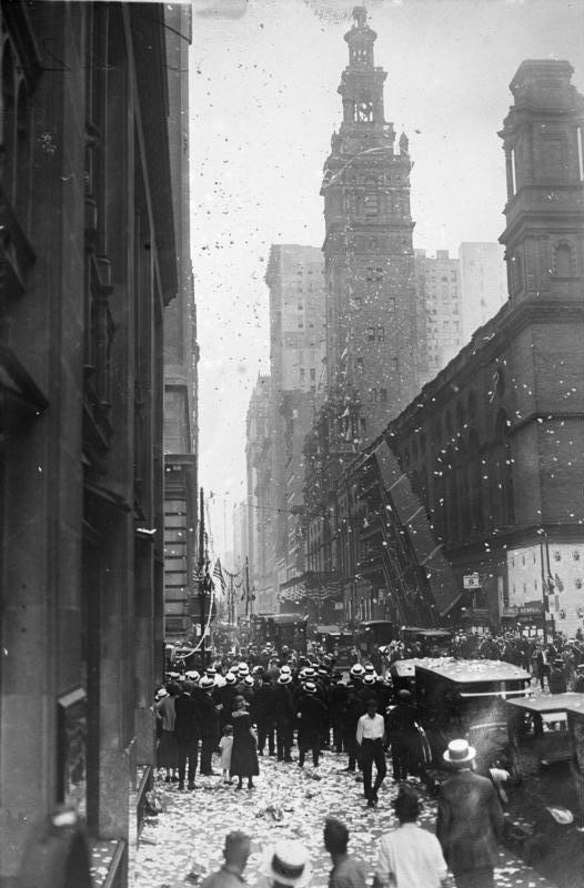 So empfing man den deutschen Ozeanflieger von Gronau in New York ! Papierregen zwischen den Wolkenkratzeren während der Fahrt Gronaus zum Rathaus.